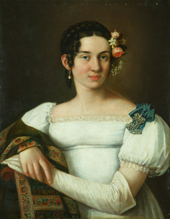 Графиня Мария Александровна Мусина-Пушкина, урожд. княжна Урусова (1801—VI 1853), во 2 браке жена А.М.Горчакова.